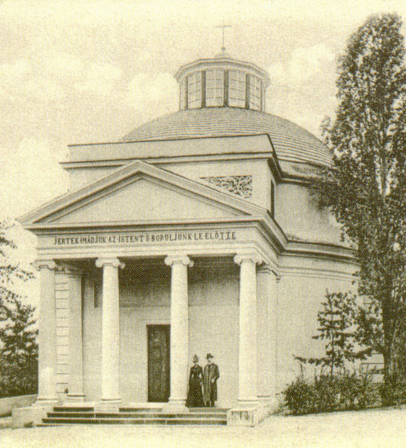 Kerek templom; Balatonfüred